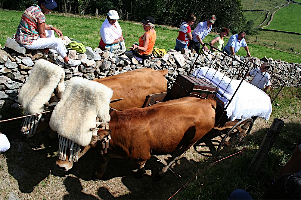 Imagen de la boda vaqueira